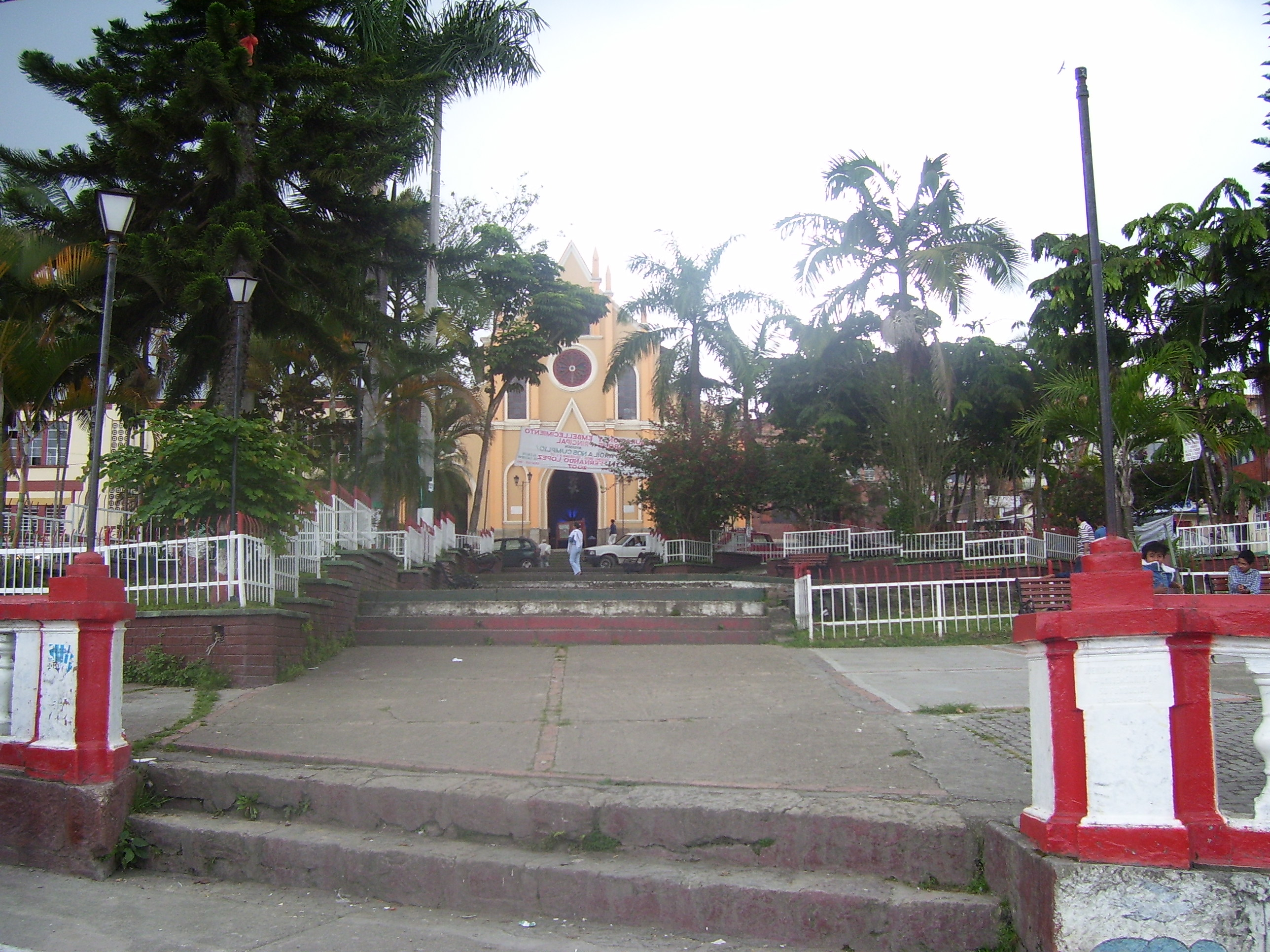 Parque principal de Cachipay Cundinamarca